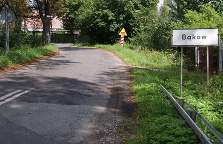 Polska